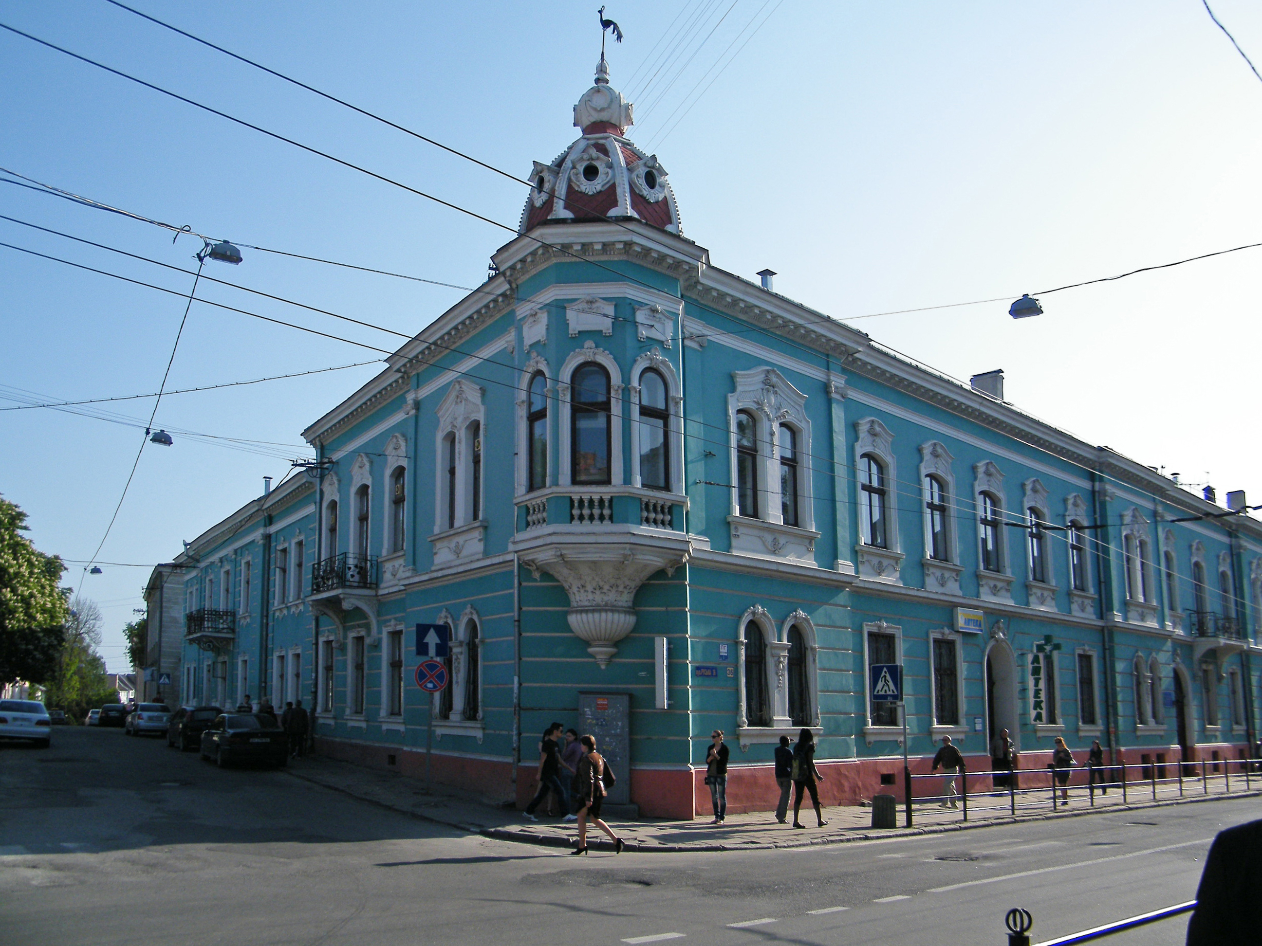 Пам'ятка архітектури місцевого значення: житловий будинок (мурований) на вул. Руській, 36 у Тернополі.